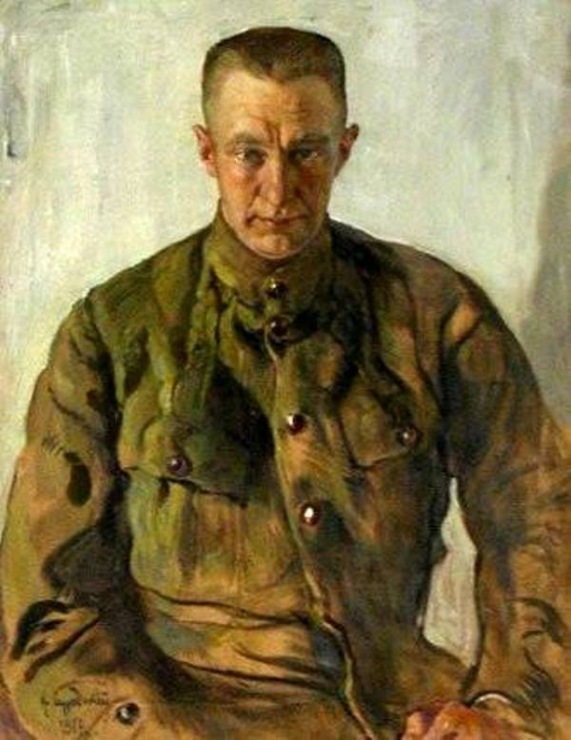 Retrato al óleo de Aleksandr Kérenski en 1917-1918, por Isaac Brodsky.